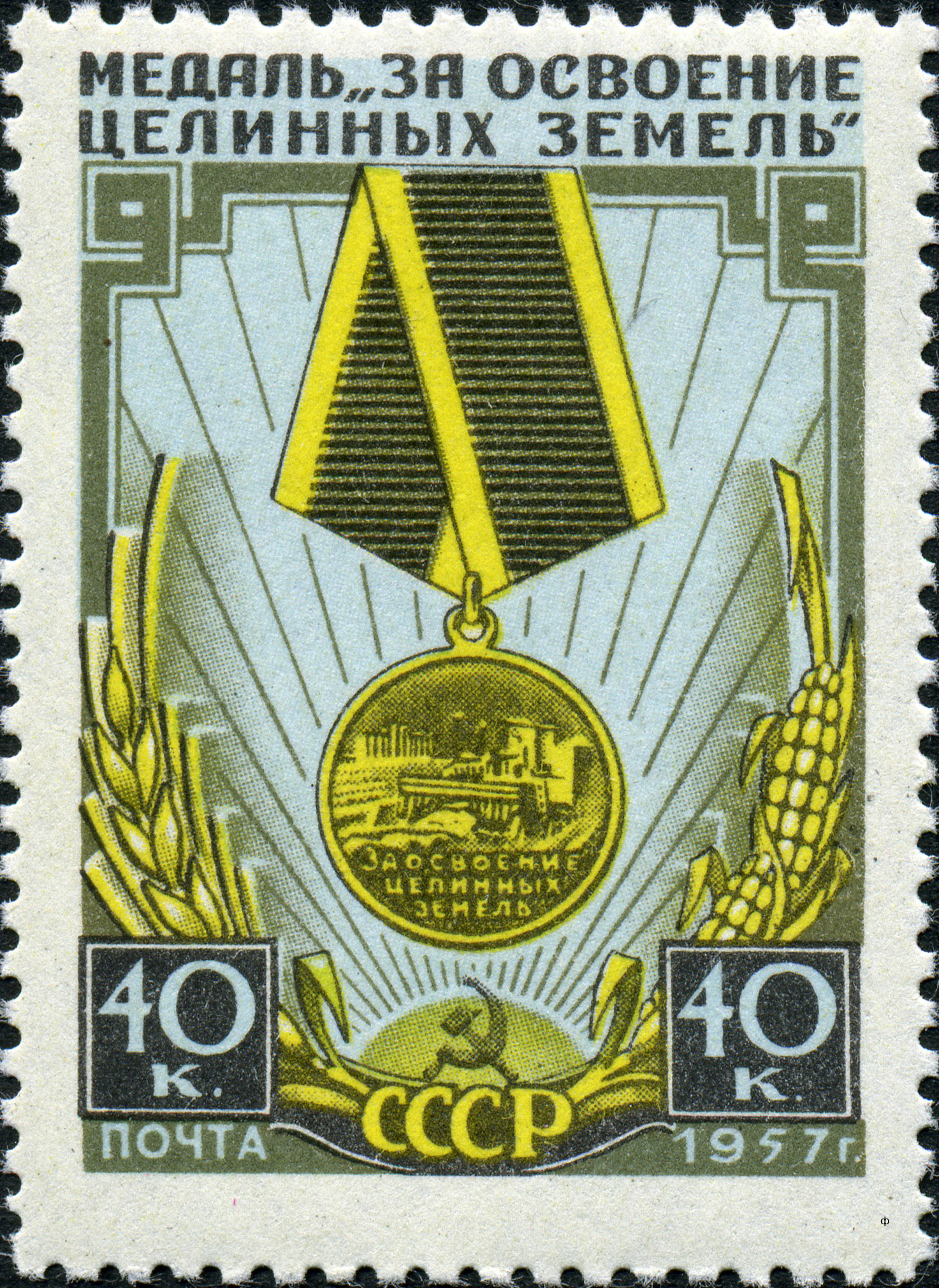 Марка СССР